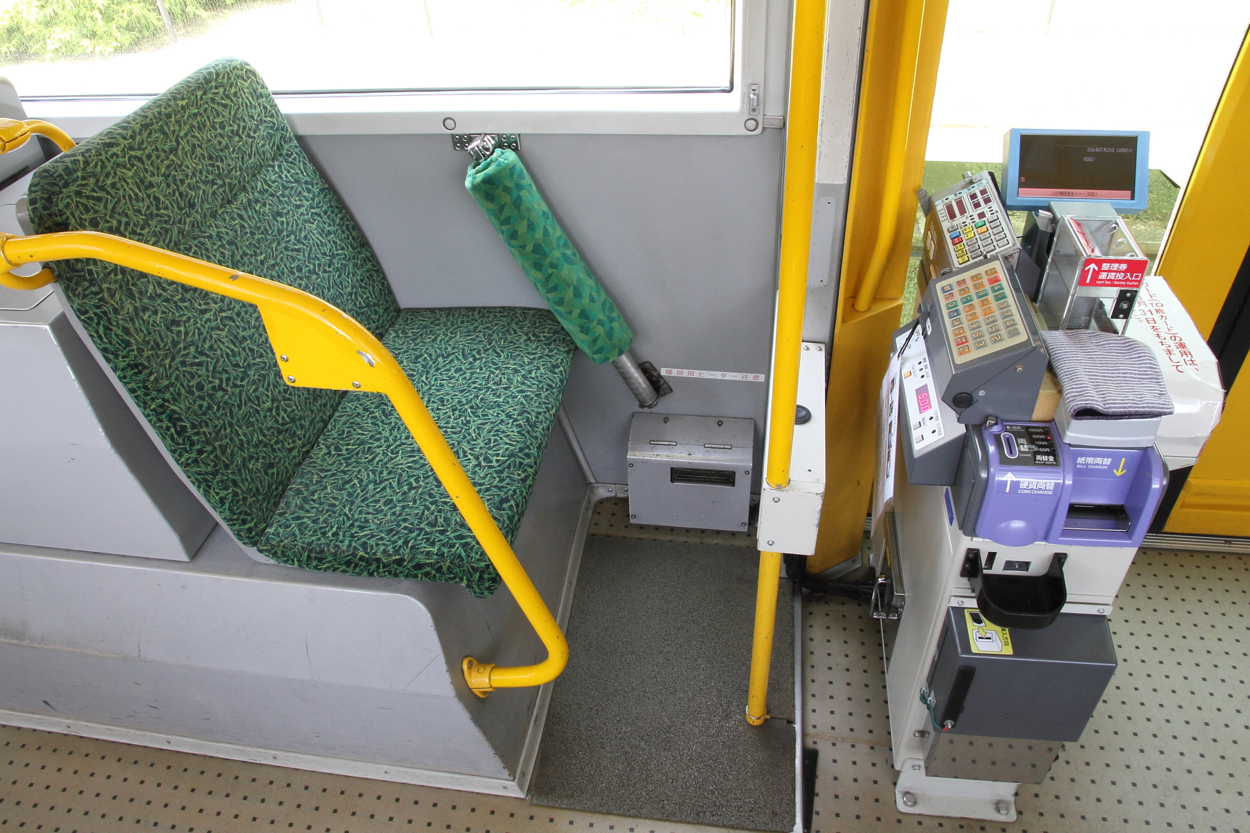 熊本市電9704号の車掌台（ただし非使用時に撮影）